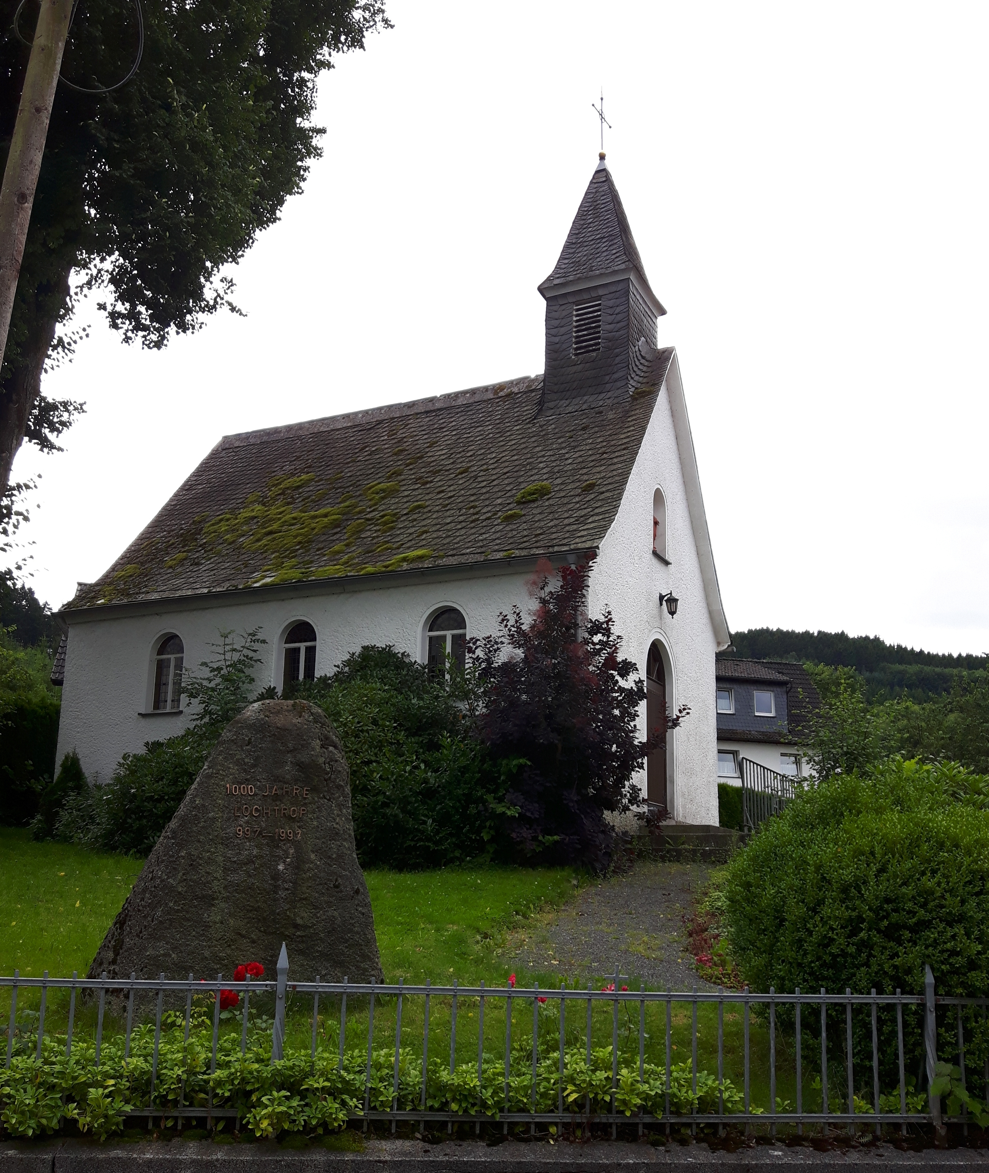 Kapelle der unbefleckten Empfängnis Maria in Lochtrop (Eslohe)